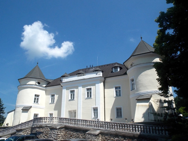 Hotel y restaurant Afrodita, categoria 5 estrellas